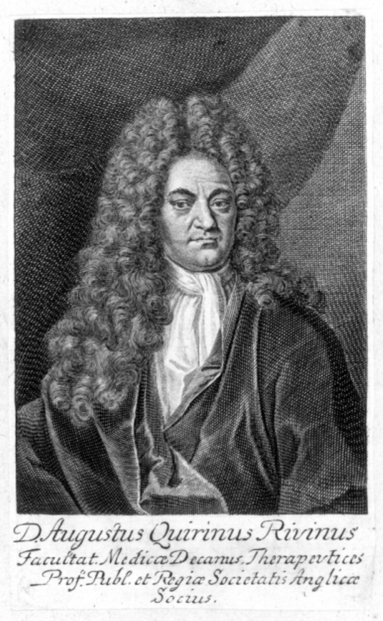 August Quirinus Rivinus (* 9. Dezember 1652; † 20. Dezember 1723), deutscher Mediziner und Botaniker.